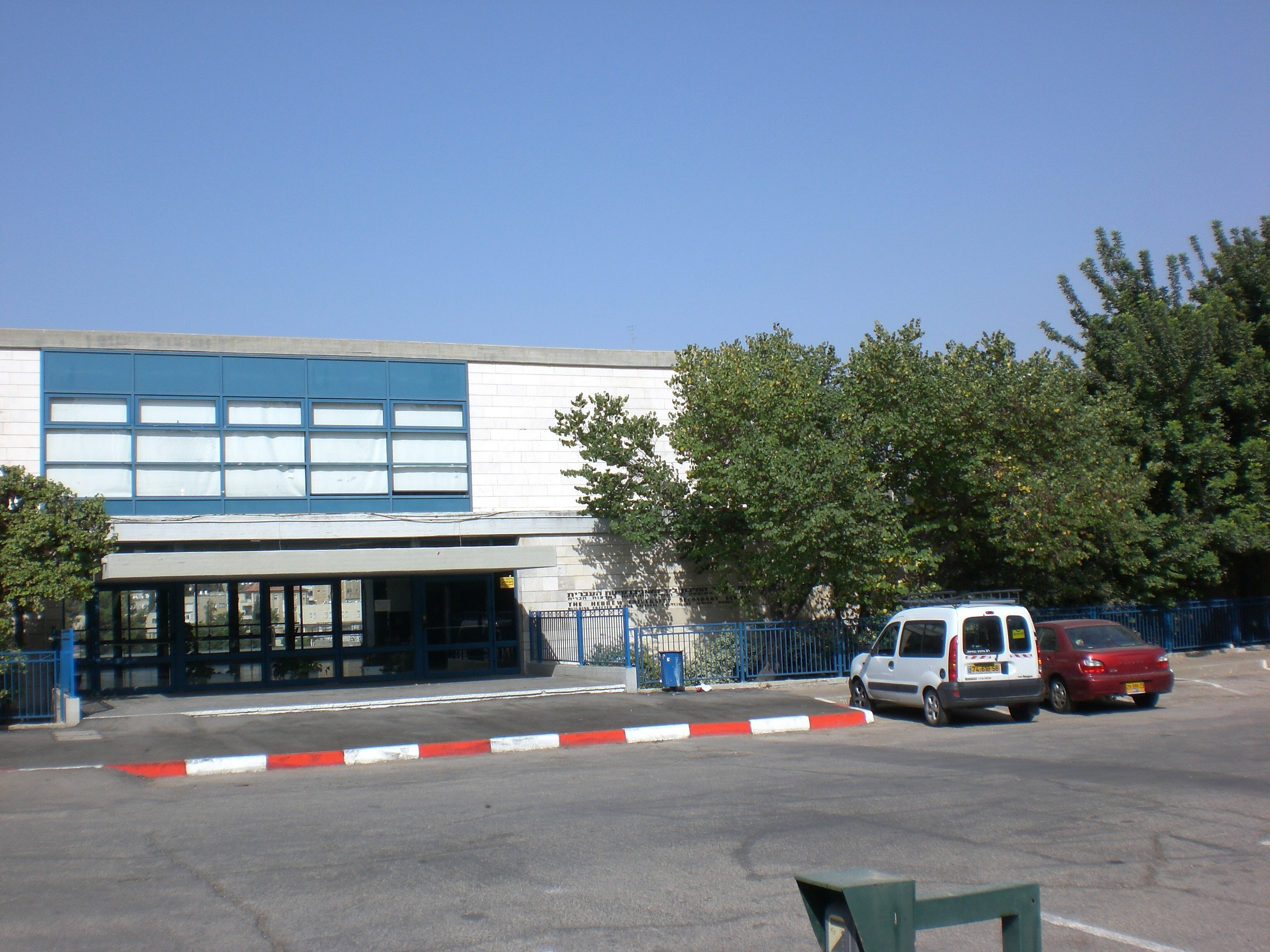 The front of the Hebrew University High School חזית בית הספר התיכון שליד האוניברסיטה העברית